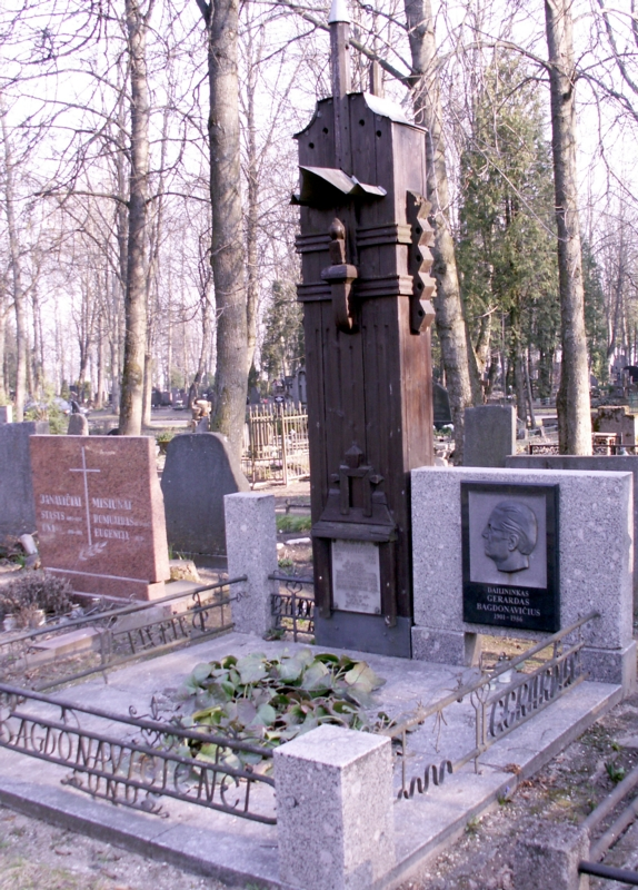 Gerardo Bagdonavičiaus ir jo motinos kapas Donelaičio kapinėse